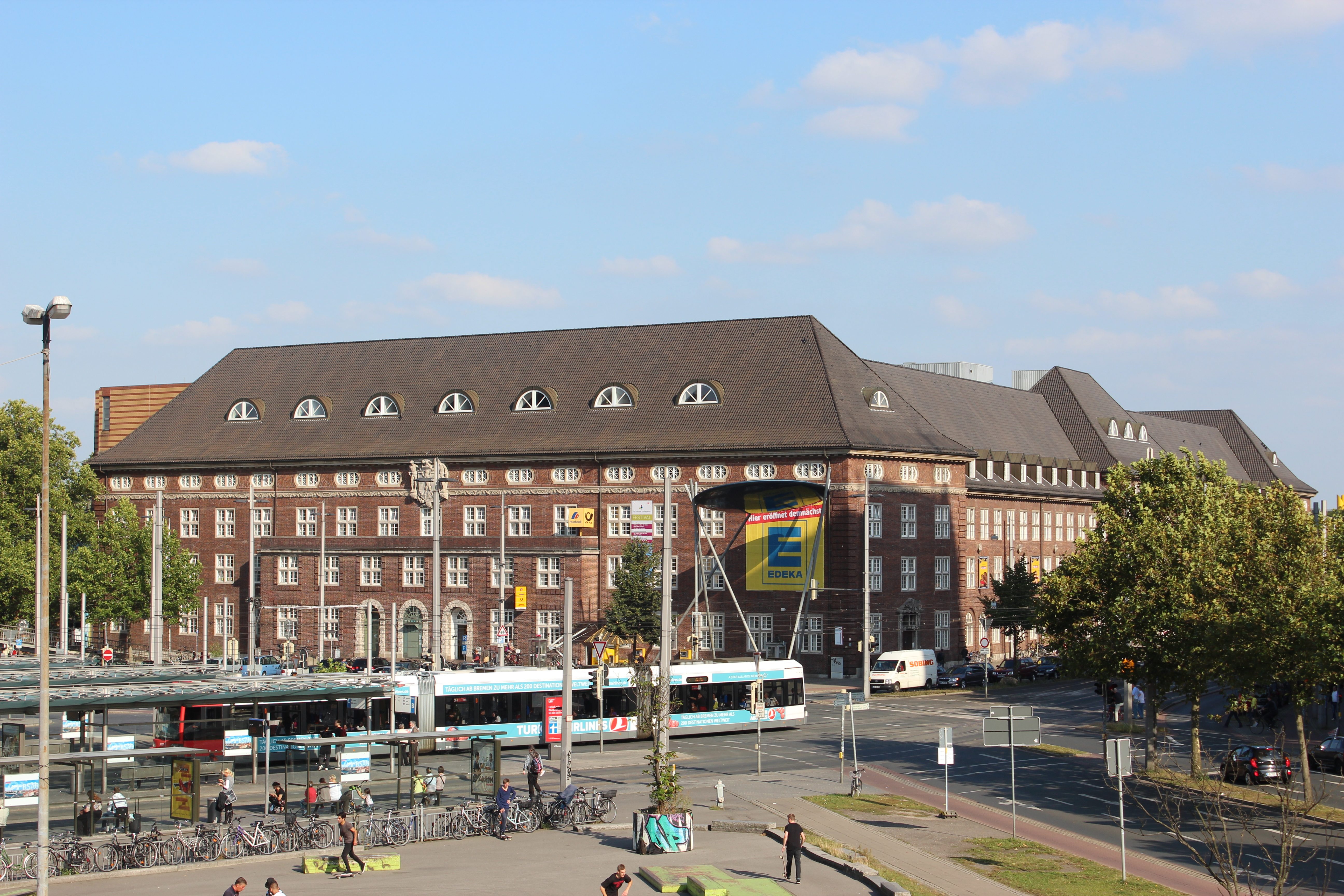 Postamt 5 in Bremen, Bahnhofsplatz 20; aufgenommen von der Hochstraße ausDas abgebildete Objekt ist ein geschütztes Kulturdenkmal in der Freien Hansestadt Bremen, mit der Nr. 0102 beim Landesamt für Denkmalpflege registriert.